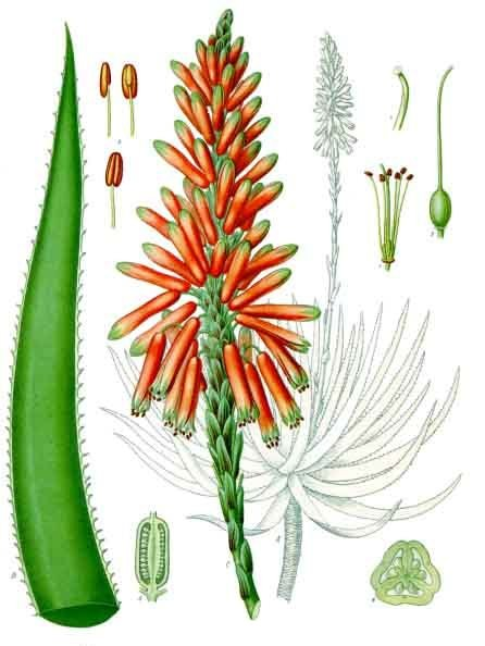 Aloë succotrina. A Pflanze, sehr verkleinert. B Blattspitze, nat. Grösse. C oberer Theil des Blüthenschaftes, nat. Grösse, 1 Blüthe ohne Perigon desgl.; 2 Staubgefässe, vergrössert; 3 Stempel vergrössert; 4 Griffelende desgl.; 5 u. 6 Fruchtknoten im Längs- und Querschnitt, desgl.